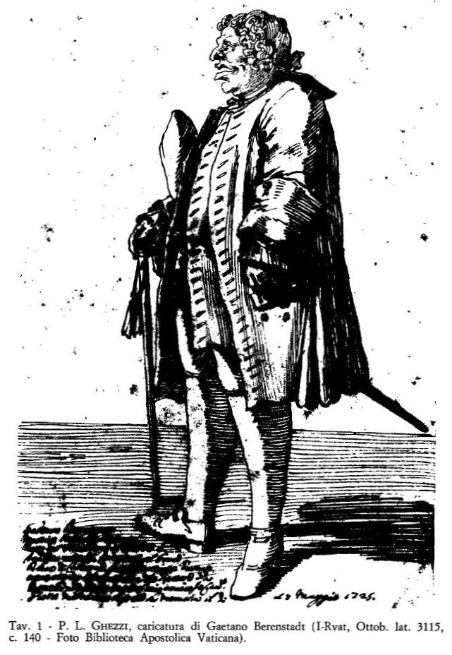 Der Kastrat Gaetano Berenstadt (oder Baerenstadt) wurde wegen seiner wuchtigen Erscheinung auch als singender Elephant bezeichnet. Die Darstellung stammt von Pier Leone Ghezzi und wird in der Biblioteca apostolica vaticana in Vatikanstadt aufbewahrt.